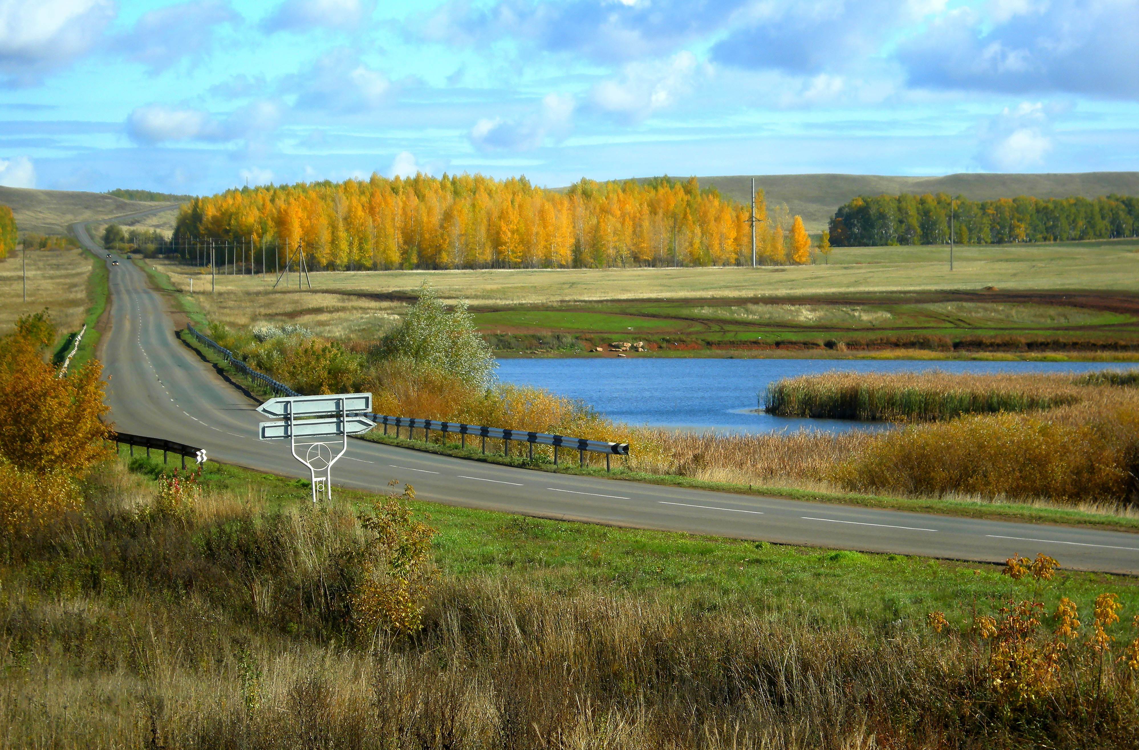 Трасса возле села Власовка